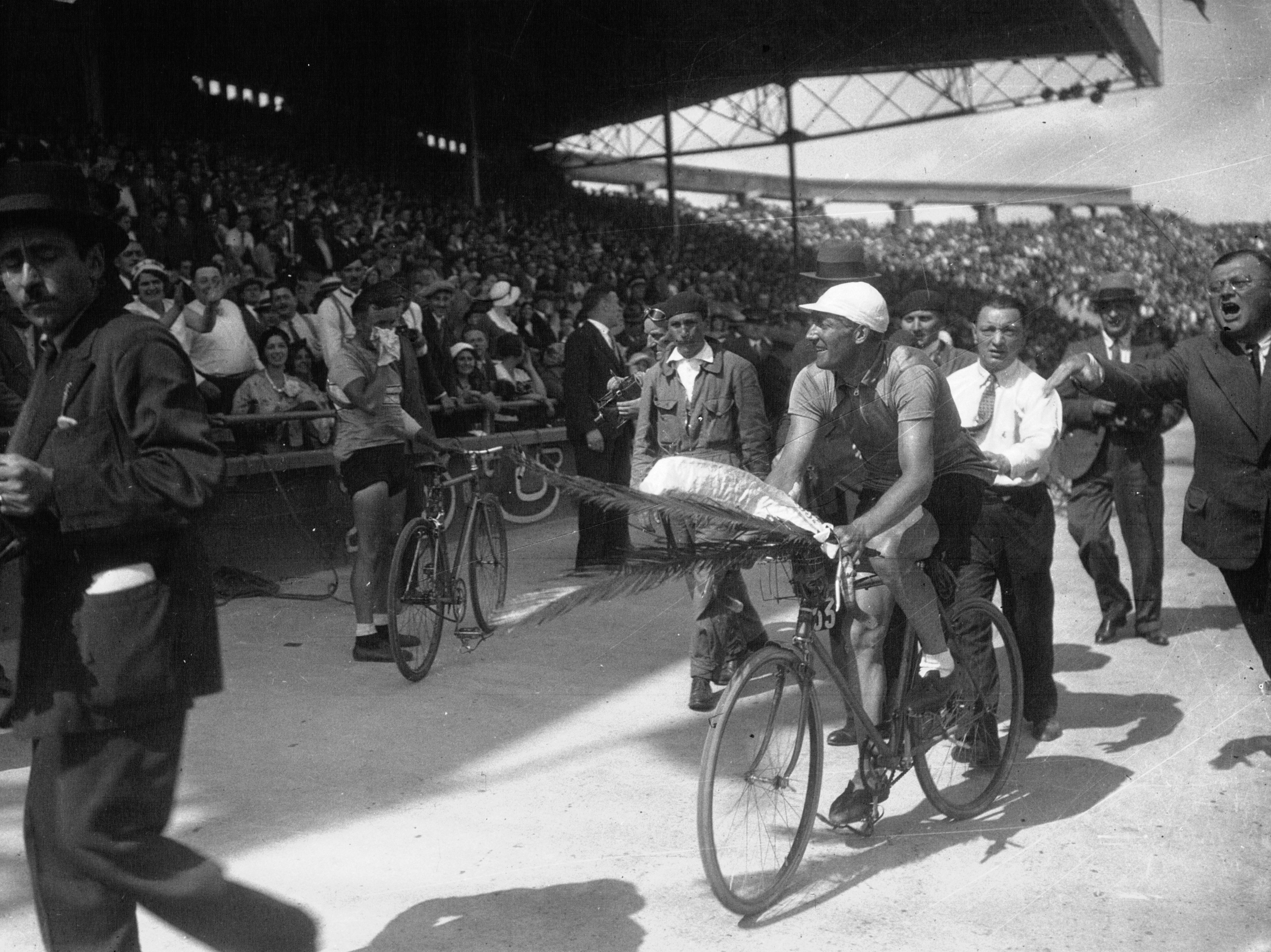 André Leducq, gagnant du Tour de France 1932